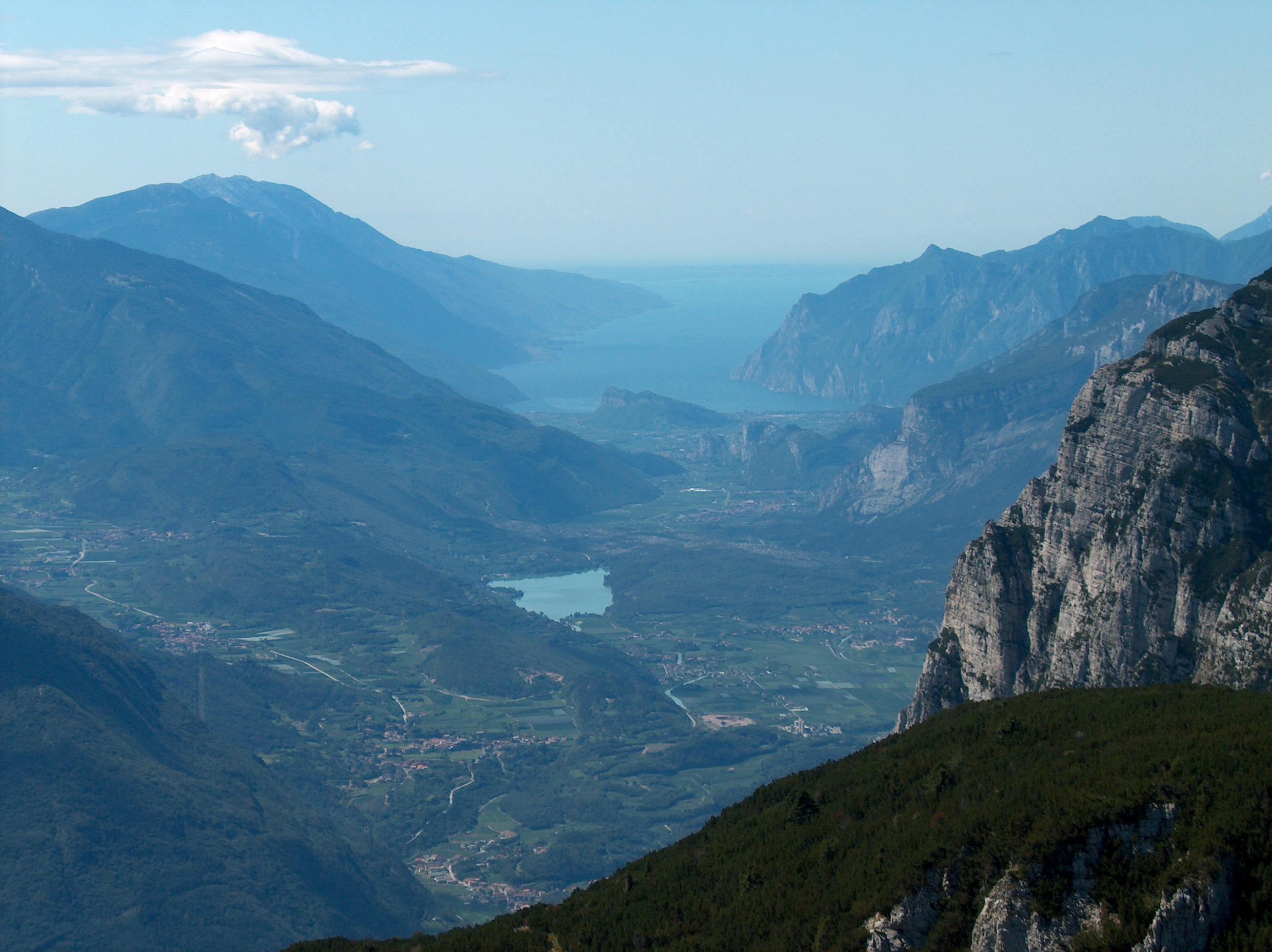 Foto del lago di garda dalla paganella